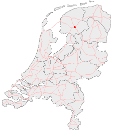 eigen werk